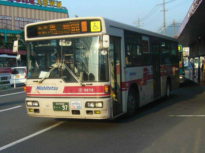 登録番号 北九州200か・・97 西鉄バス北九州小倉営業所所属 車番5678 2007年7月26日 砂津バスセンターにて撮影